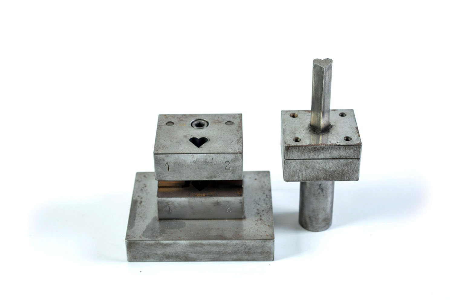 מכבש שאילון עיצב